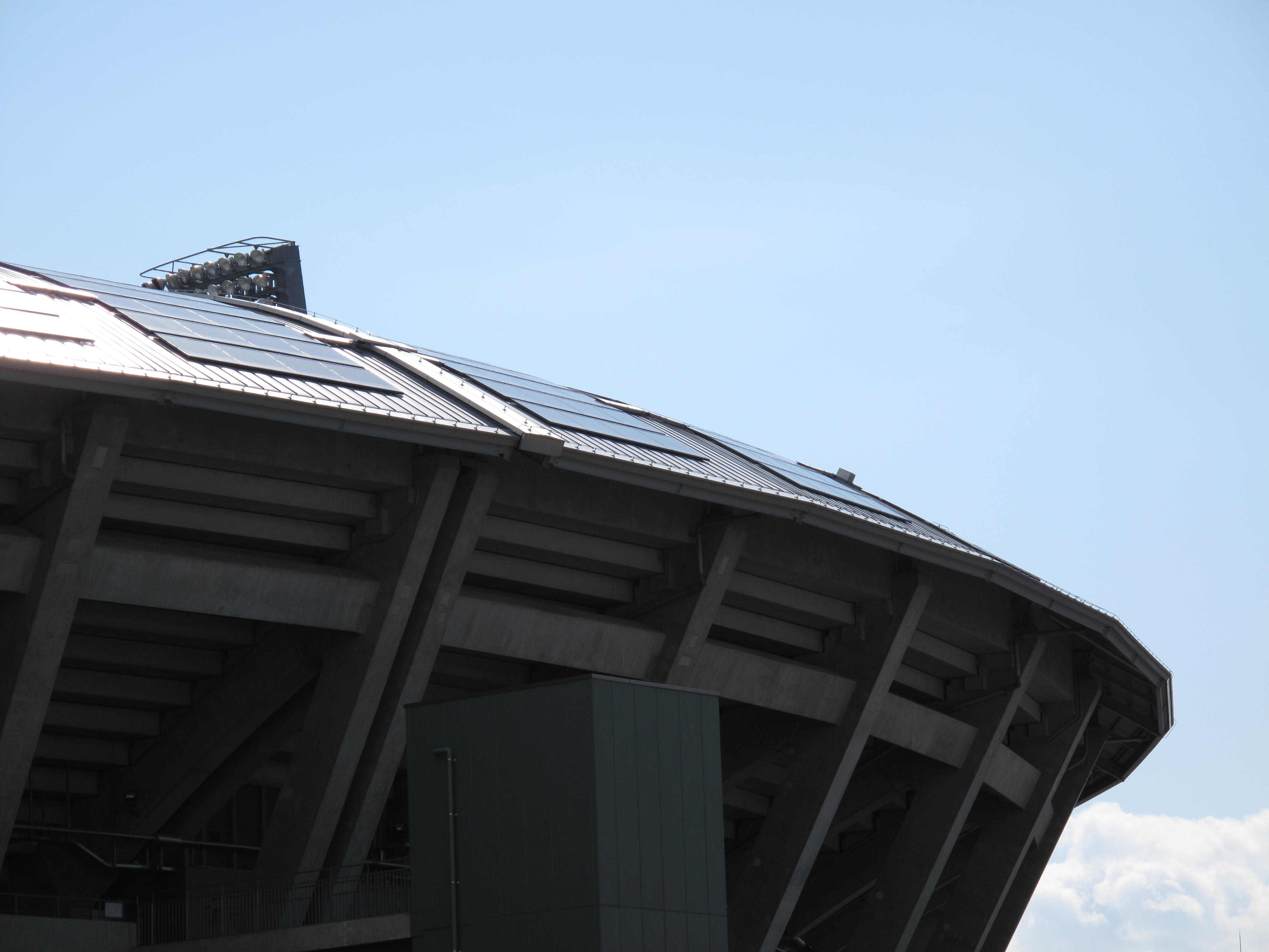 2010年にMAZDA Zoom-Zoom スタジアムに設置された太陽光発電設備を撮影